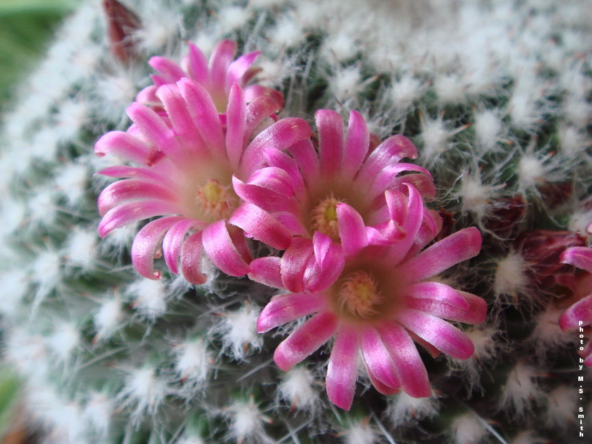 Mammillaria standleyi (craigii)